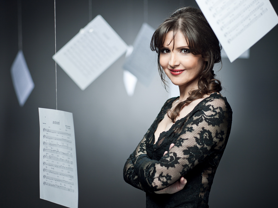 Studio de photo "Kikala" Tbilissi (Géorgie) Propriété de Elisso Bolkvadze